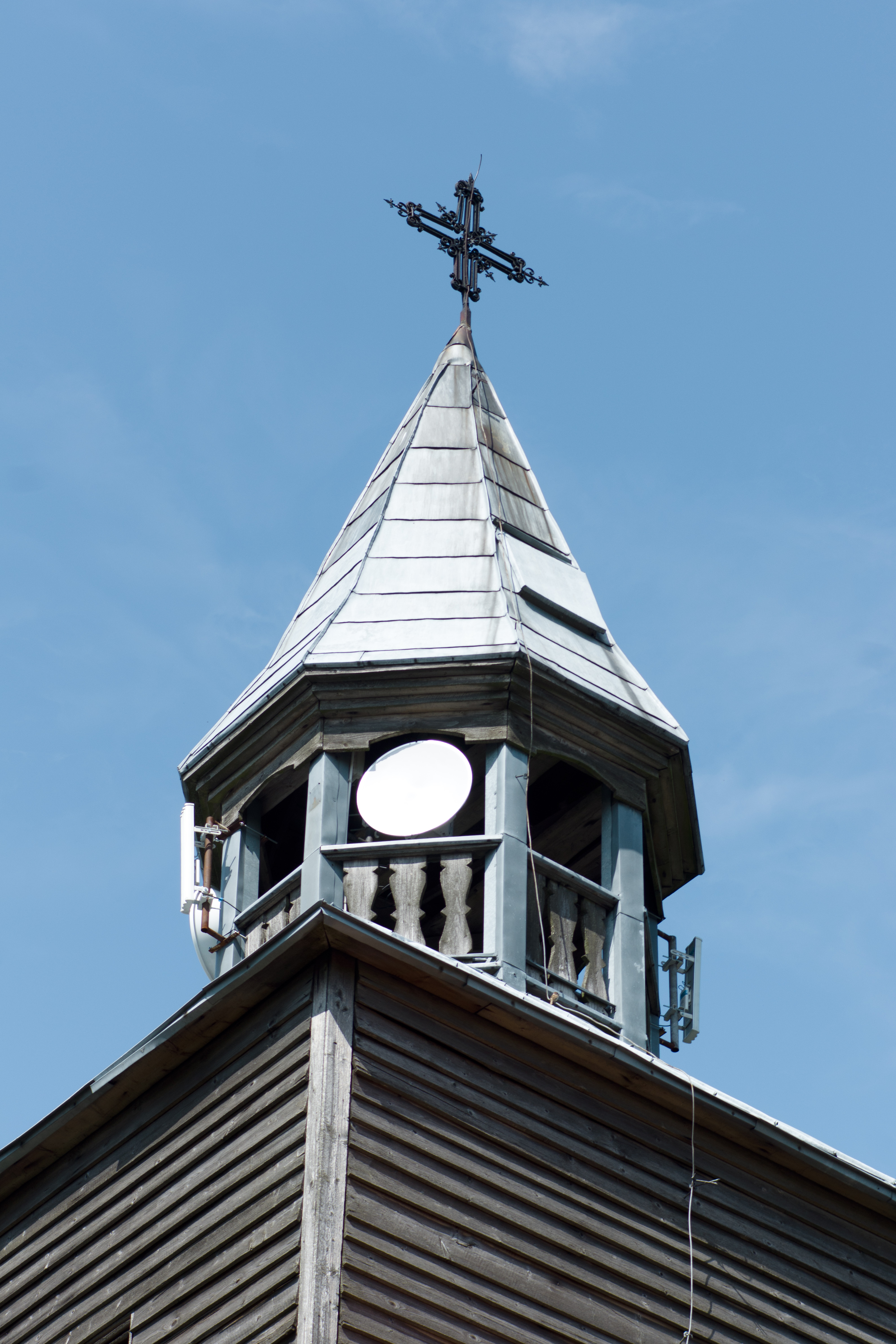 Wieża zabytkowej kaplicy p.w. MB Różańcowej w Janikowie (województwo warmińsko-mazurskie).